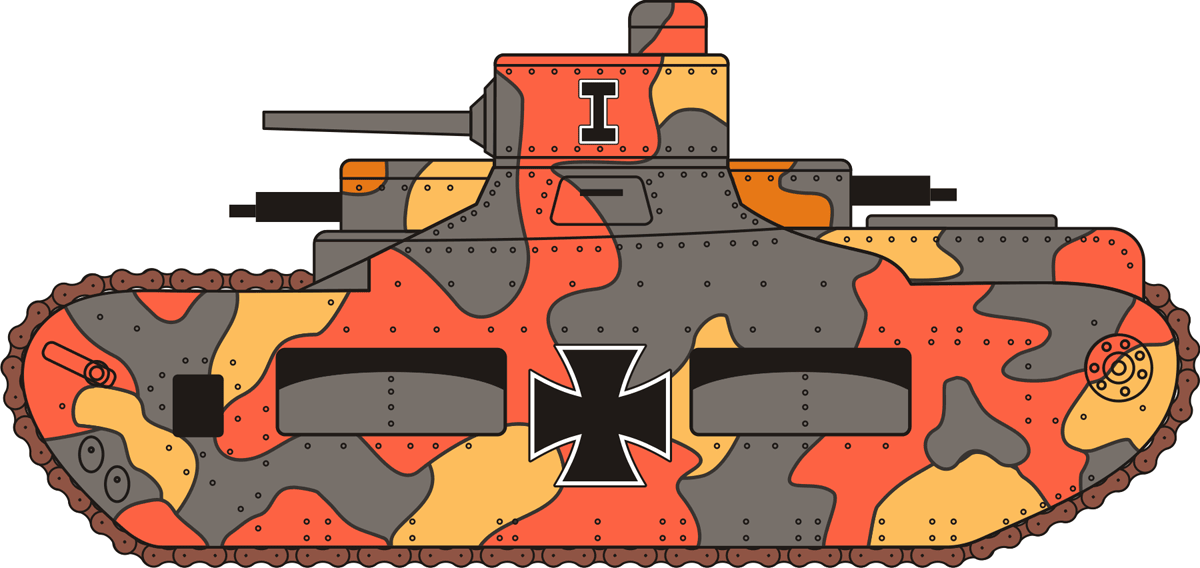 Sturmpanzerwagen Oberschlesien profile view